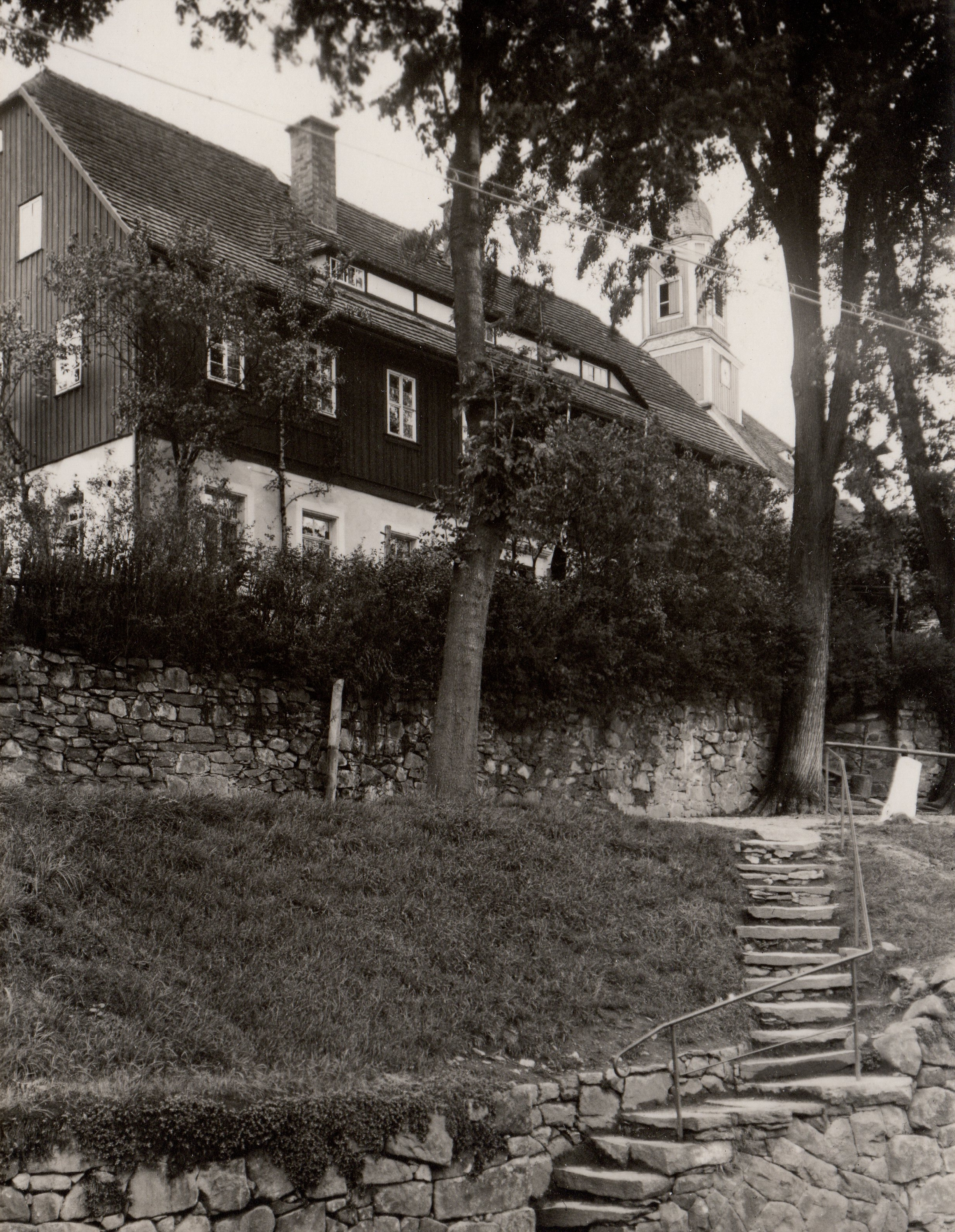 Die alte Schule in Naundorf bei Freiberg. Im Hintergrund: der Kirchturm